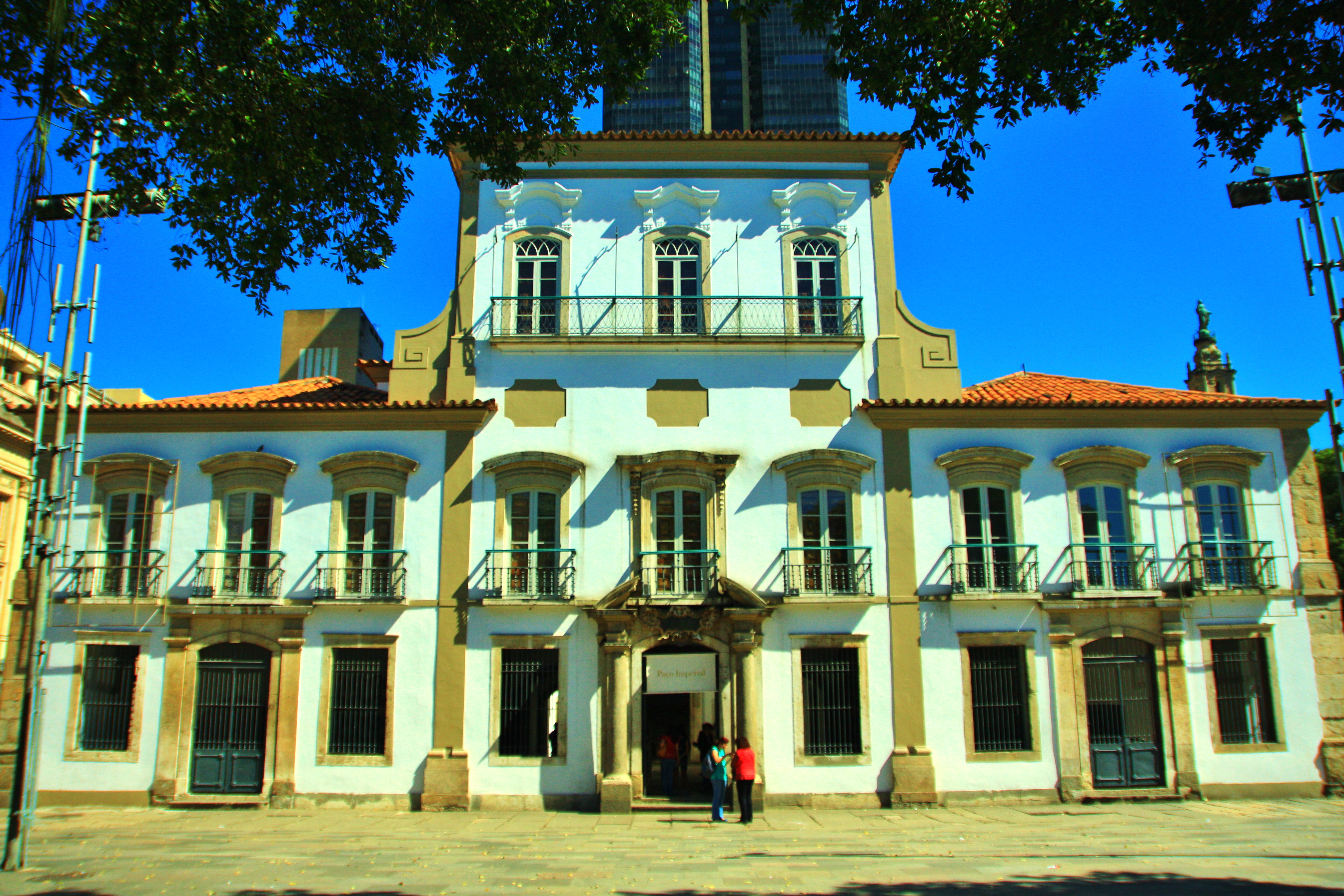 Paço Imperial